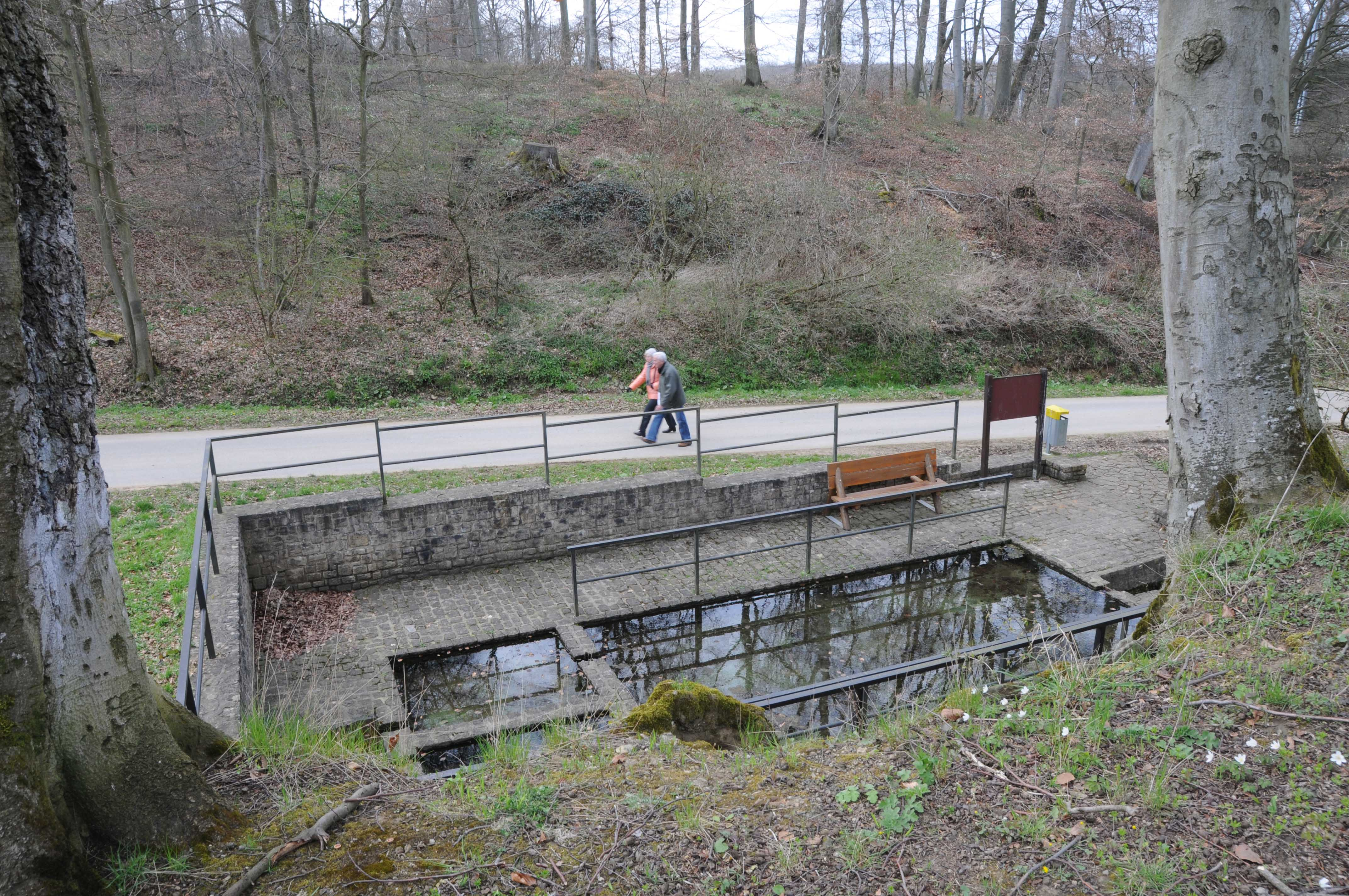 Kéibuer zu Hesper.